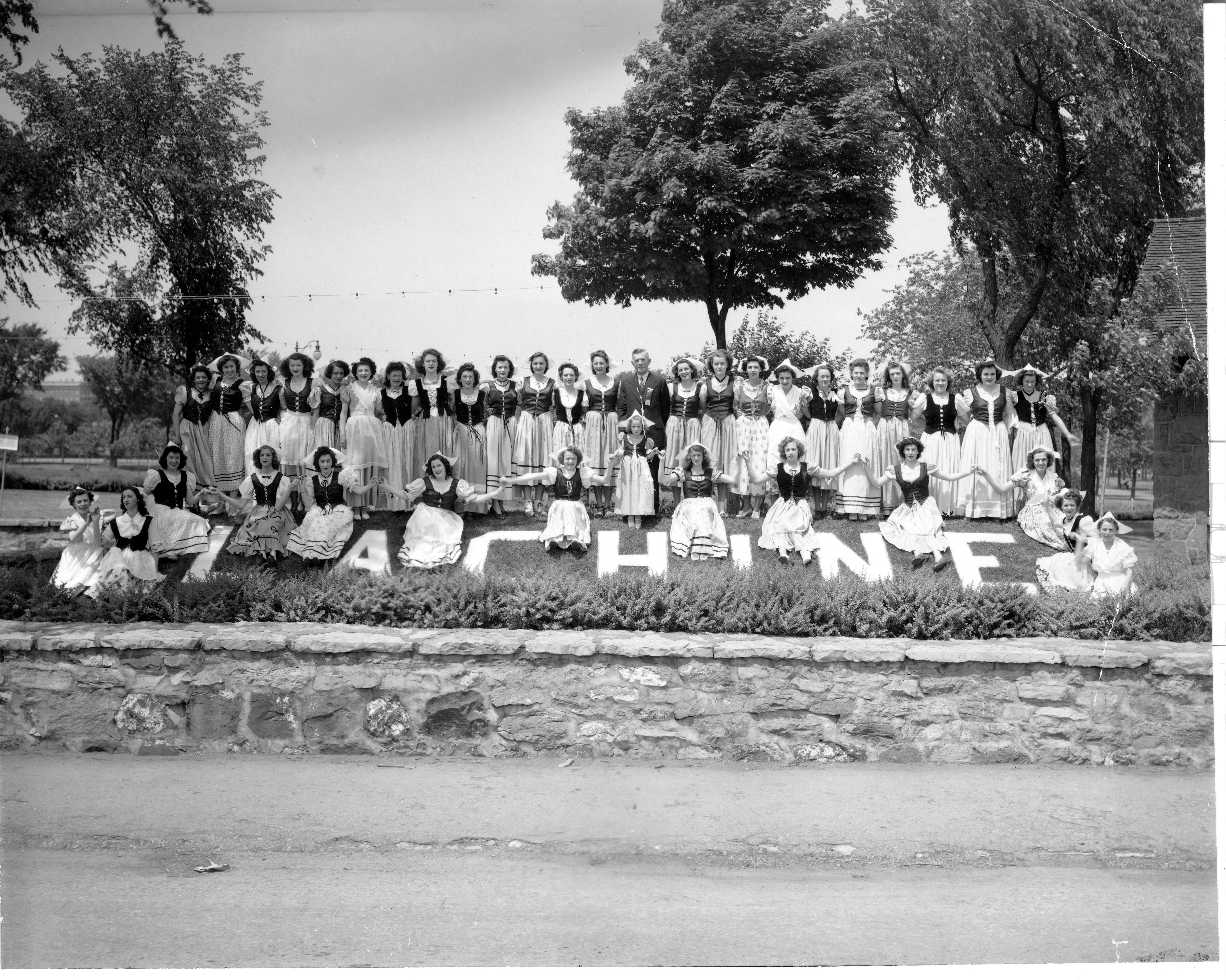 Anatole Carignan et de jeunes filles de Lachine costumées lors du 275e anniversaire, 1944. « Au milieu de ces jeunes filles en costumes d’époque, on remarque le maire Anatole Carignan. Passionné d’histoire. C’est lui qui a eu l’idée de raconter l’histoire de Lachine par l’entremise d’un pageant, un spectacle à grand déploiement. »